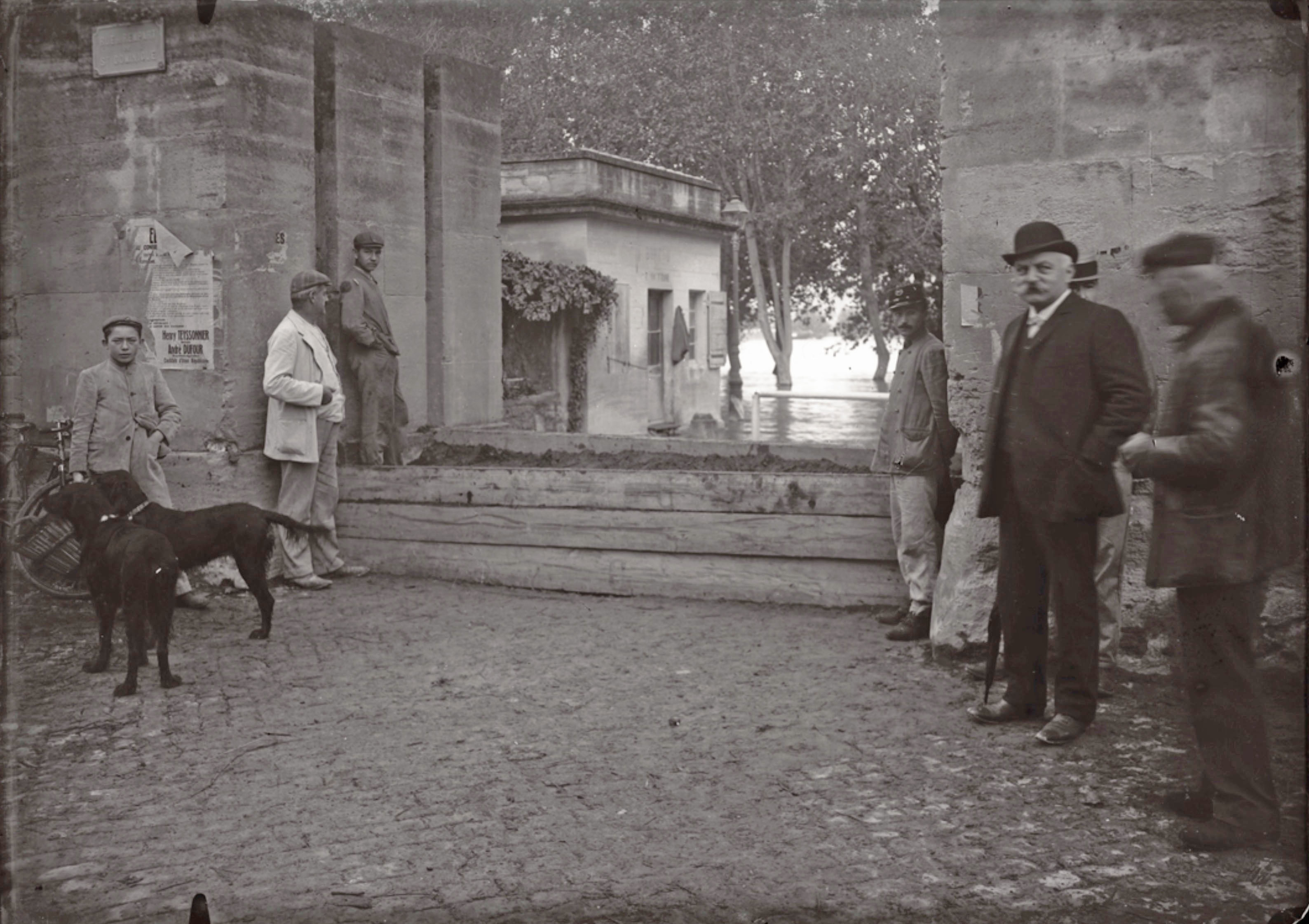 La porte de la Ligne avec ses batardeaux destinés à lutter contre la crue